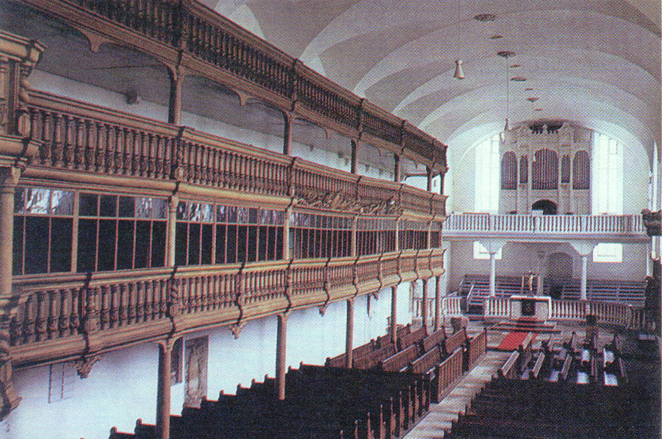 Reproduktion